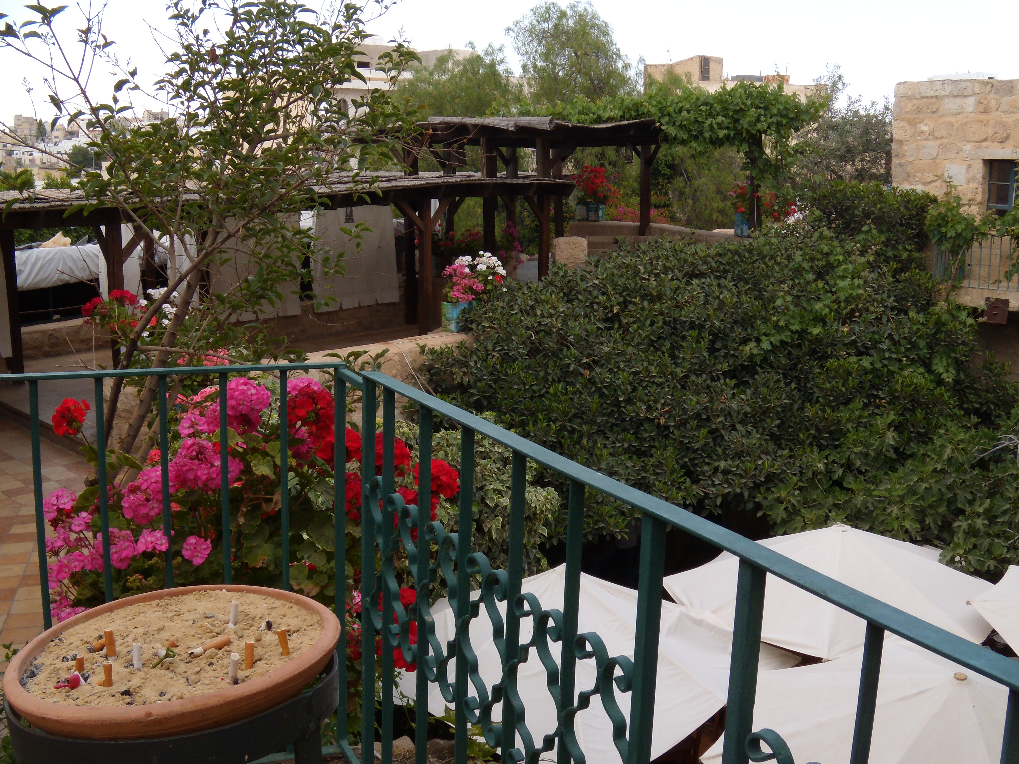 Haret Jdoudna Restaurant, Madaba, Jordan, 5.01.2010